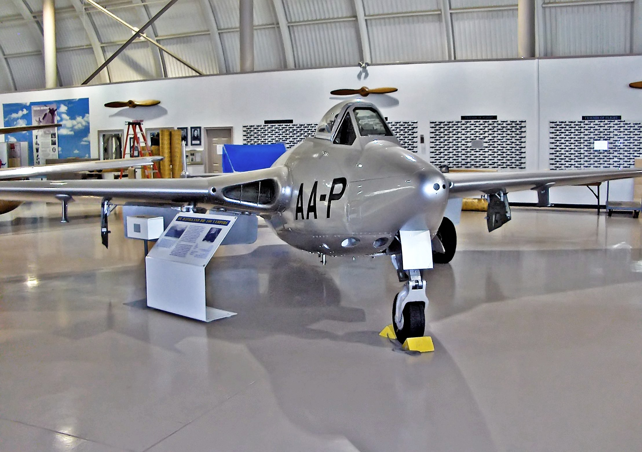 DH-100 Vampire (Taken By Redkryptonite)